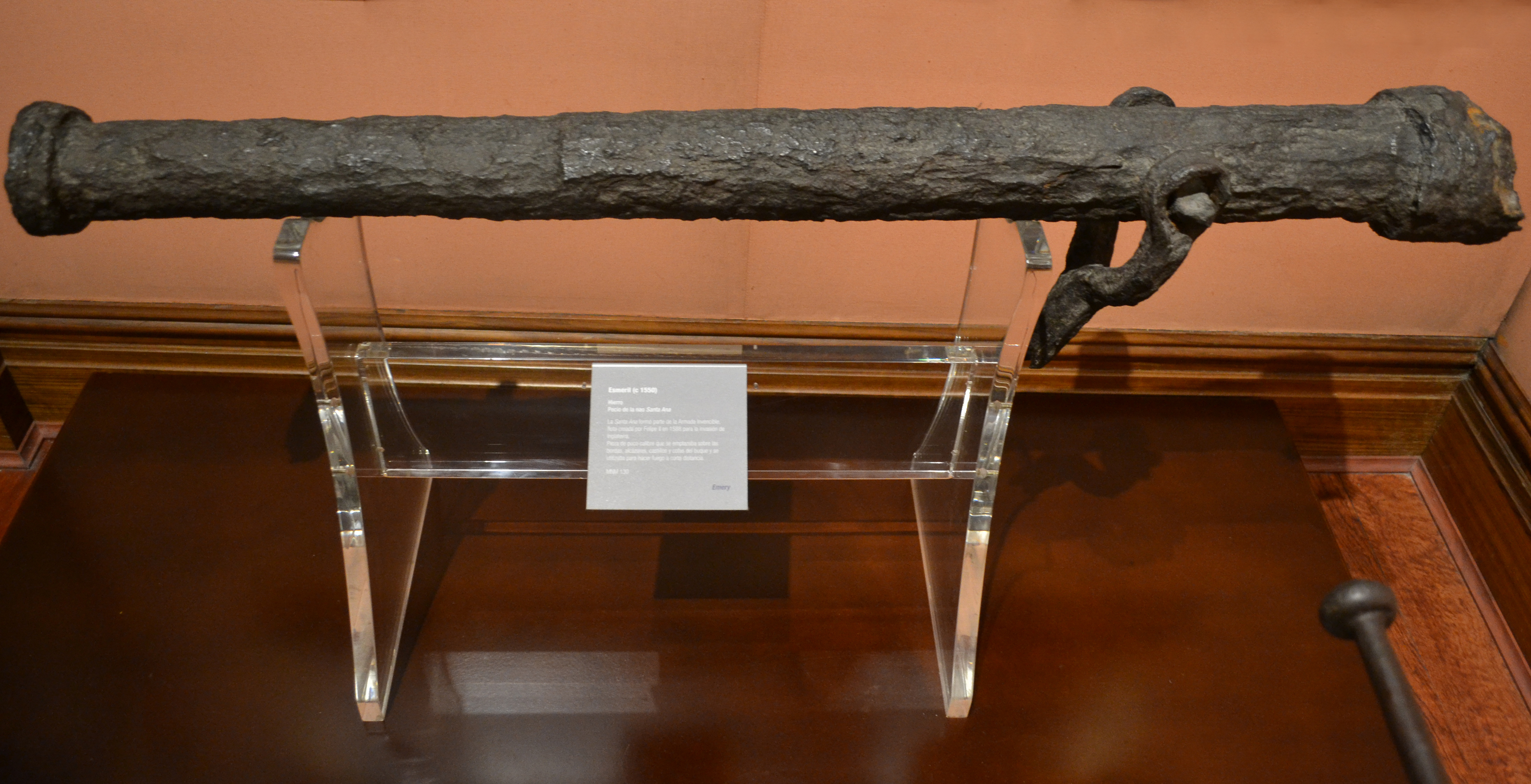 Esmeril de hierro de la nao Santa Ana, que formó parte de la Armada Invencible. Circa 1550. Pieza de poco calibre que se emplazaba sobre las bordas, alcázares, castillos del buque y se utilizaba apra hacer fuego a corta distancia. Nº inv. 130. Museo Naval de Madrid.